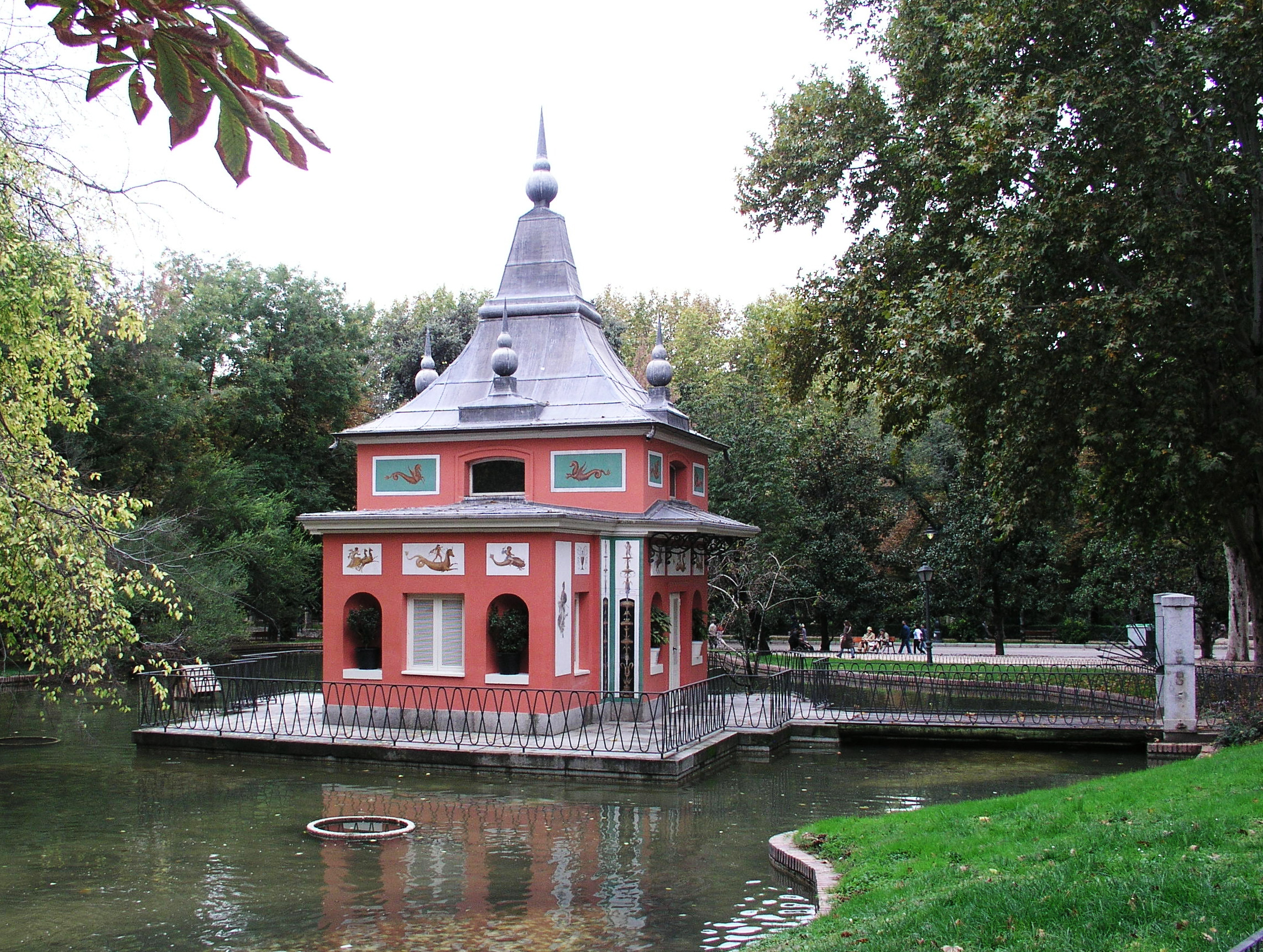 Jardines del Buen Retiro, Madrid, Spain. Casita del Pescador.